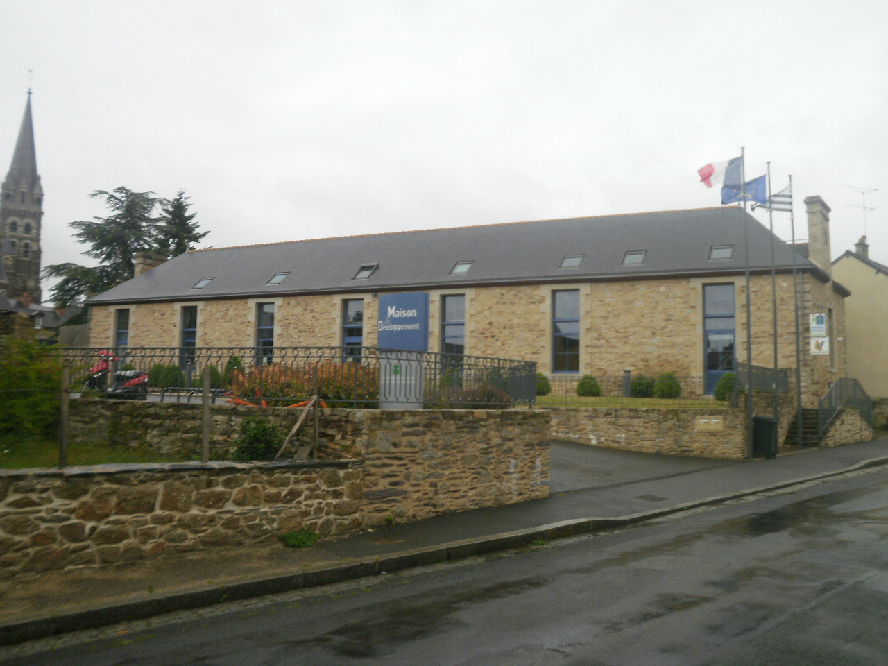 Maison du développement de la communauté de communes du Pays de Maure de Bretagne